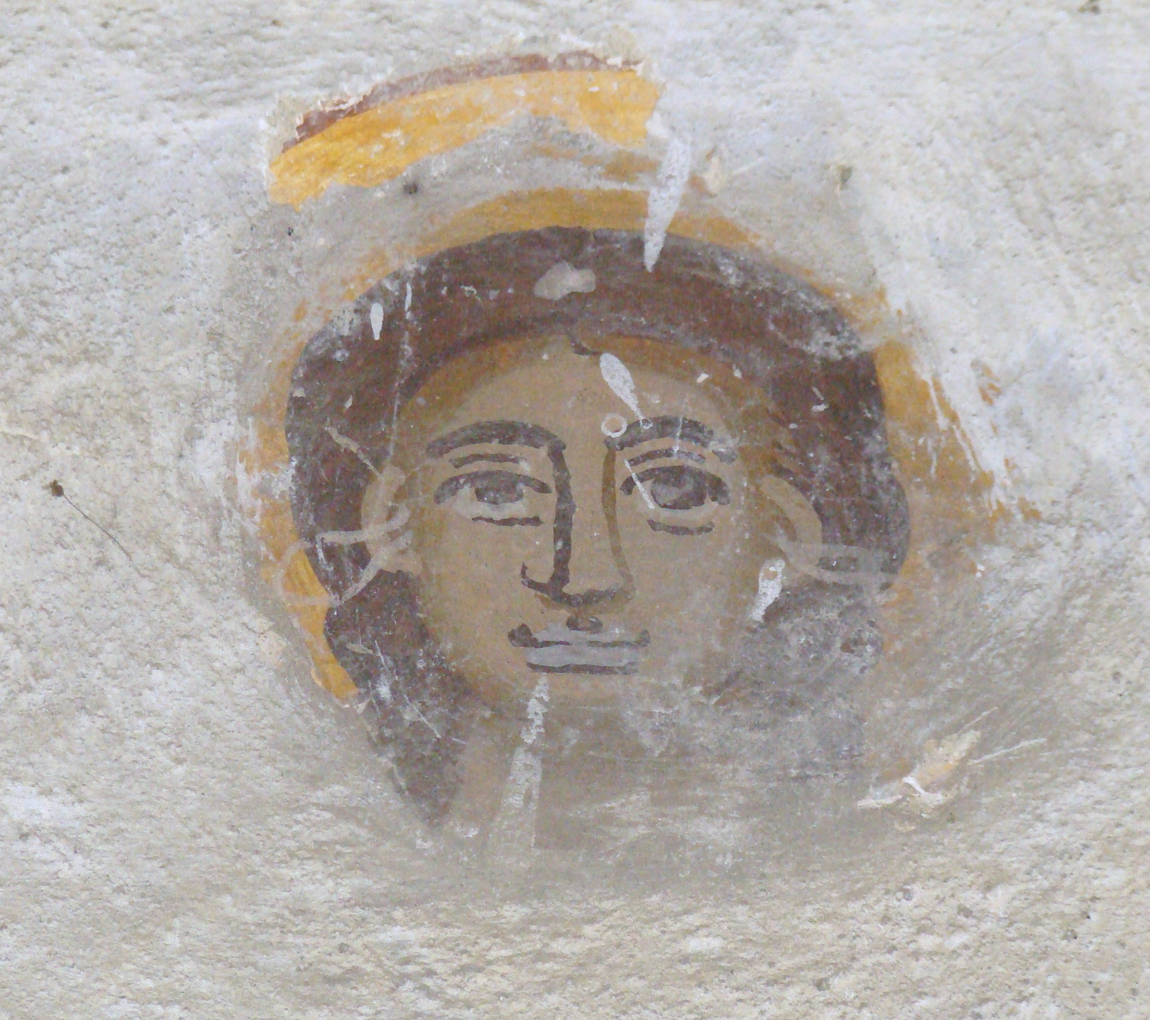 Biserica „Sfântul Prooroc Ilie”, sat Baru; comuna Baru